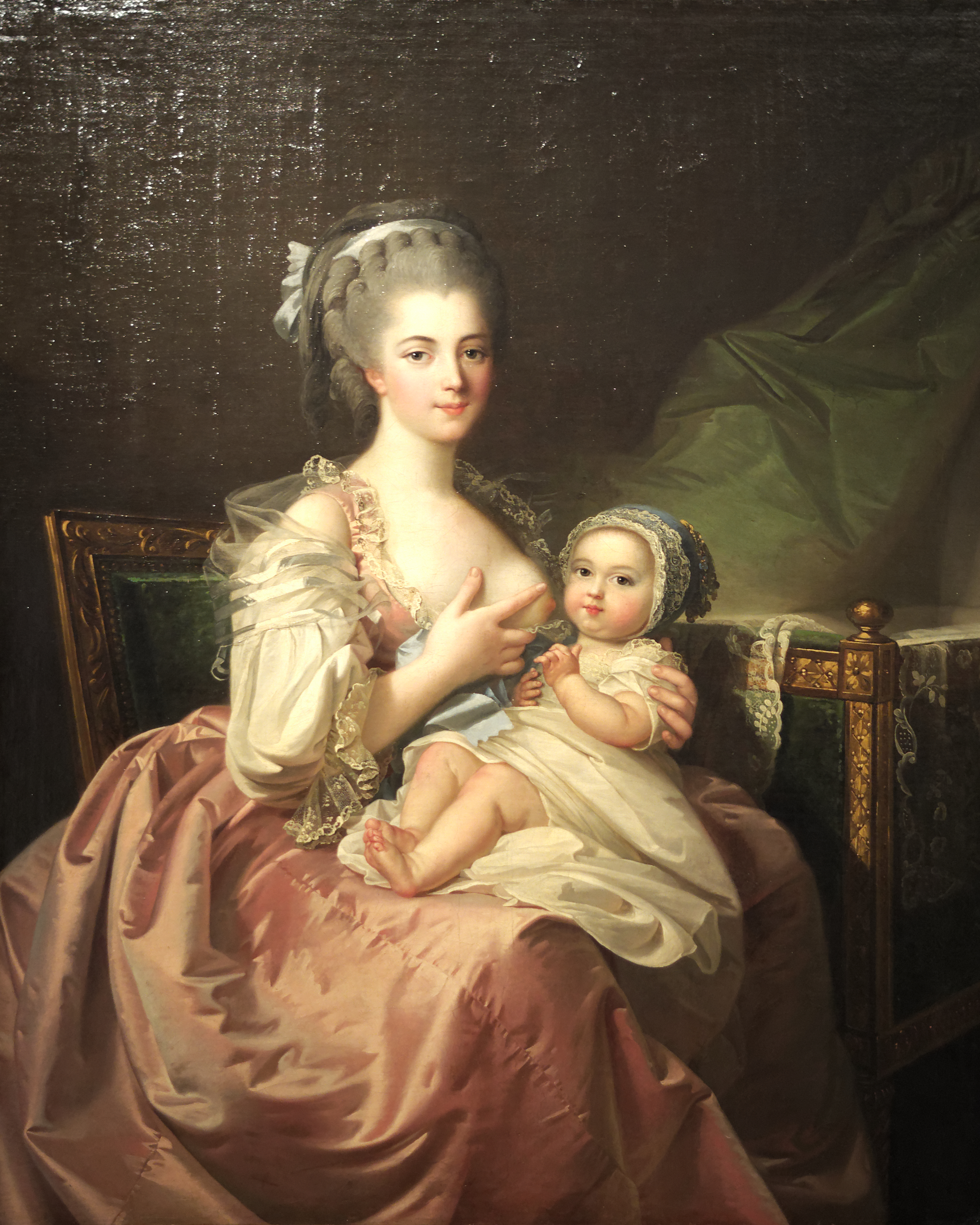 Portrait de femme allaitant son enfant S.D.m.g : J.L Mosnier pinxit 1792. Acheté à Cailleux (Paris) en 1941 par le Kaiser-Wilhelm Museum de Krefeld. Attribué au Musée du Louvre par l'Office des Biens et Intérêts privés en 1950. Déposé à Mâcon en 1955. M.N.R.56